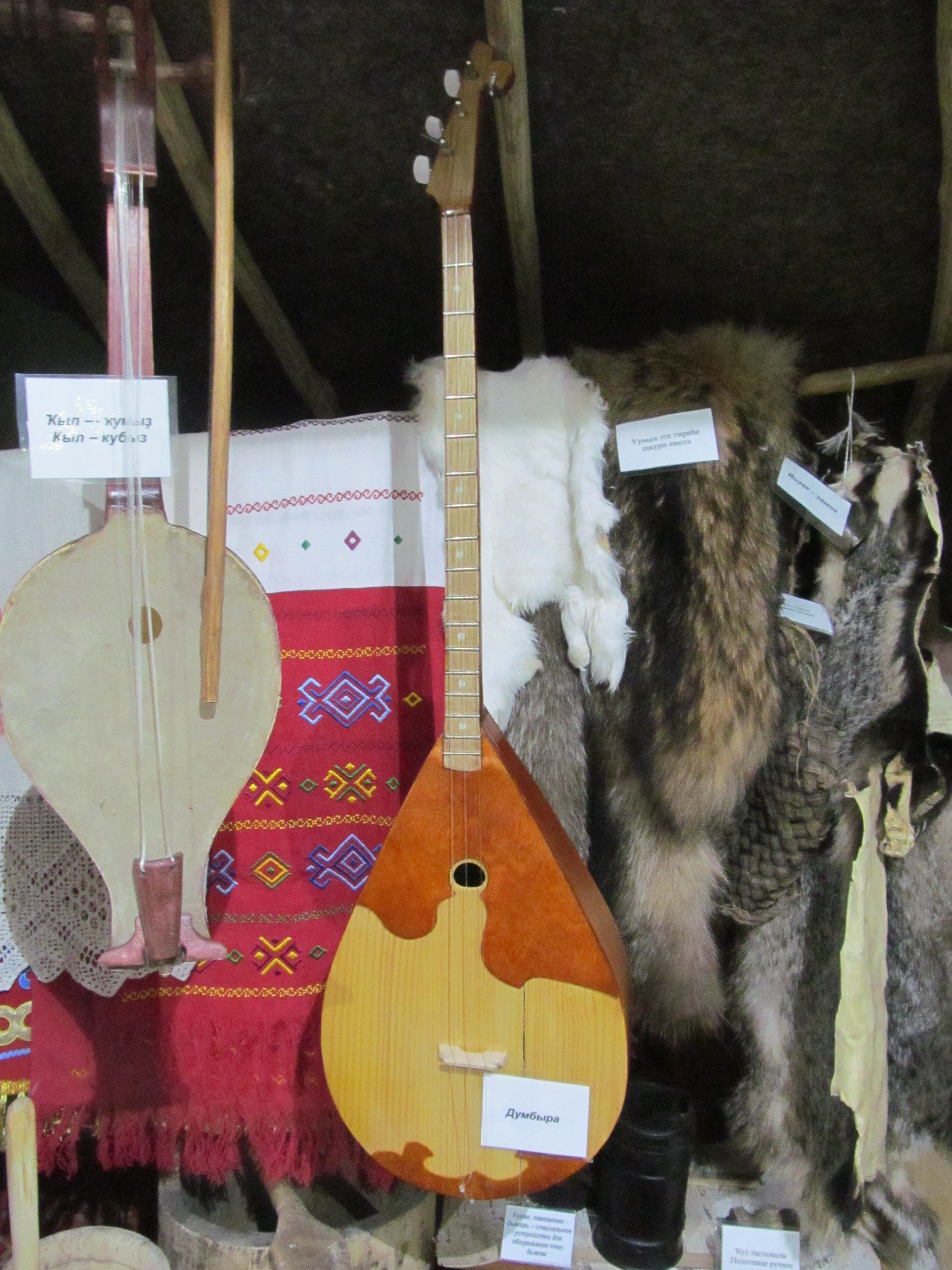 Вики-семинар Янгантау - 2016